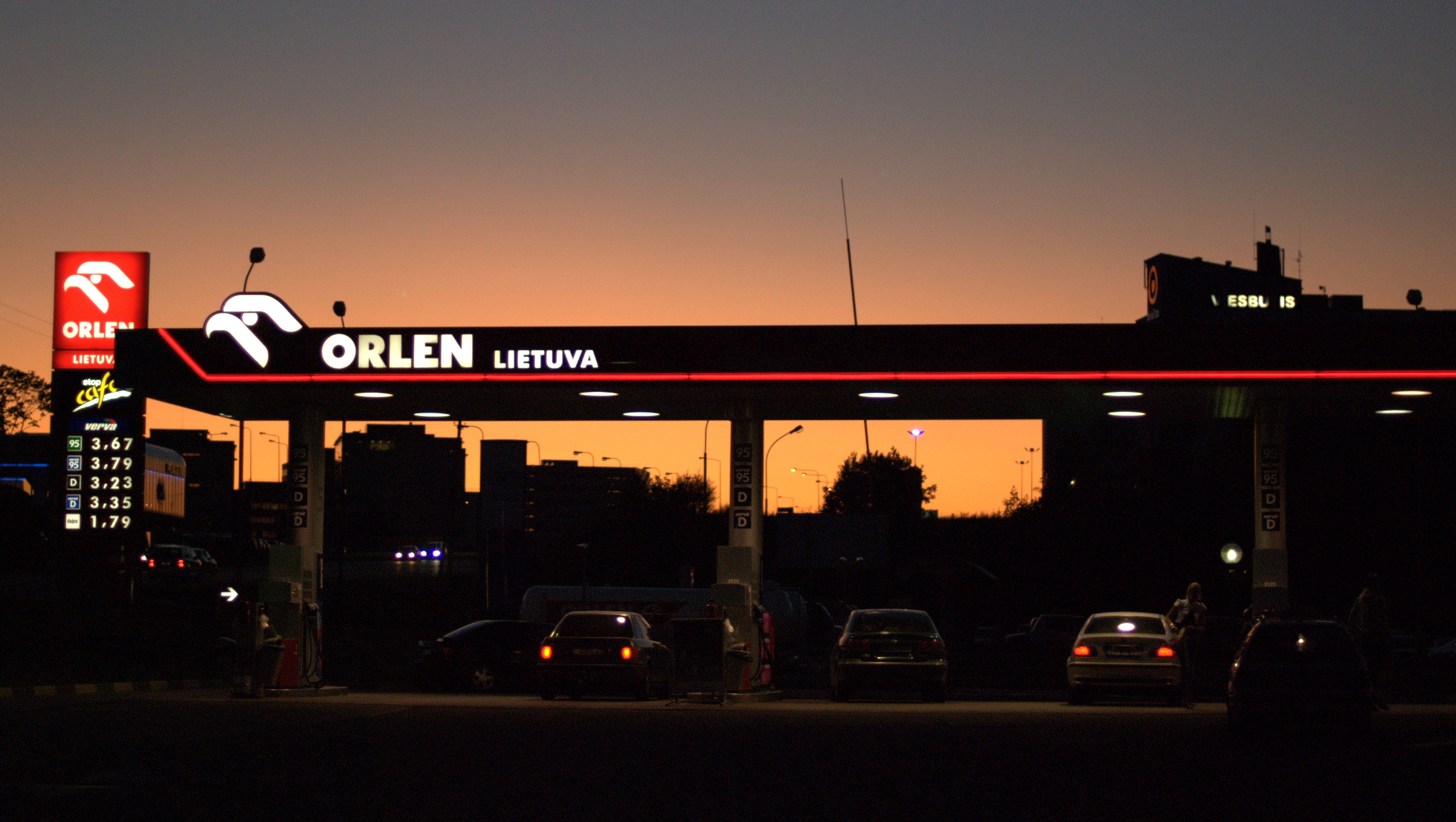 Vilnius